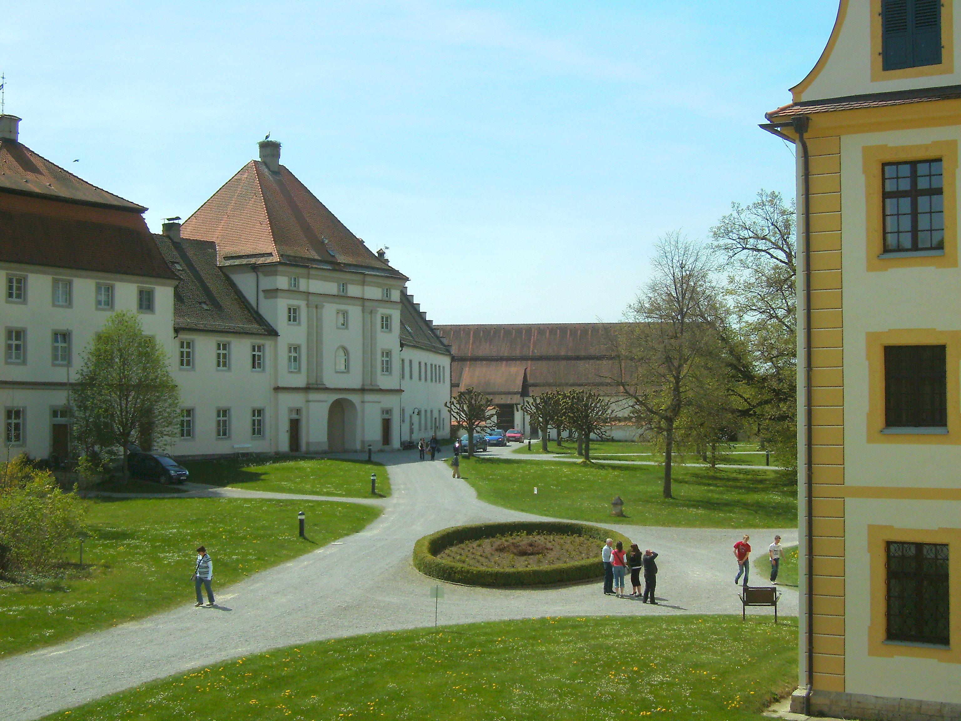 Kloster Obermarchtal